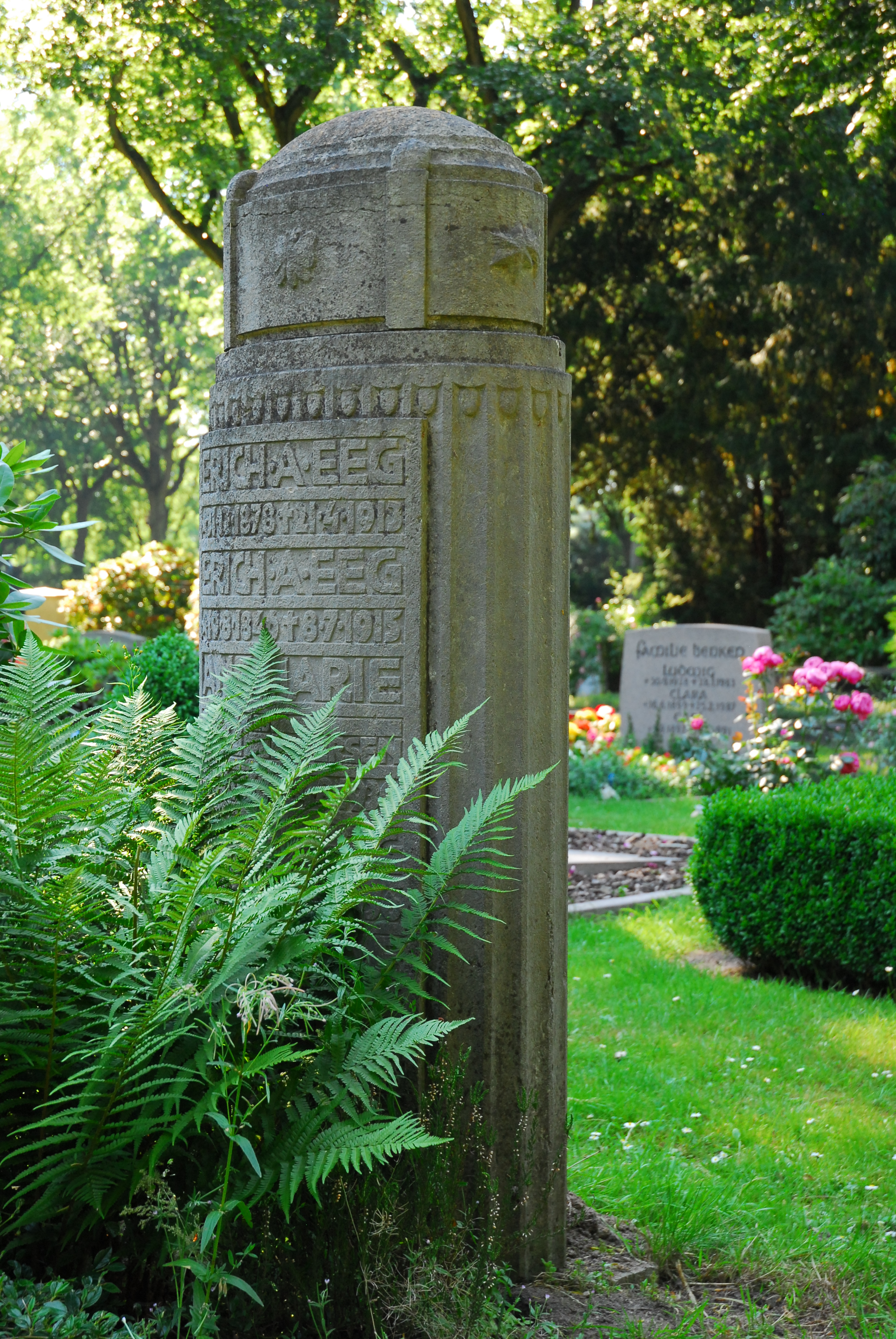 Familienbegräbnis Eeg